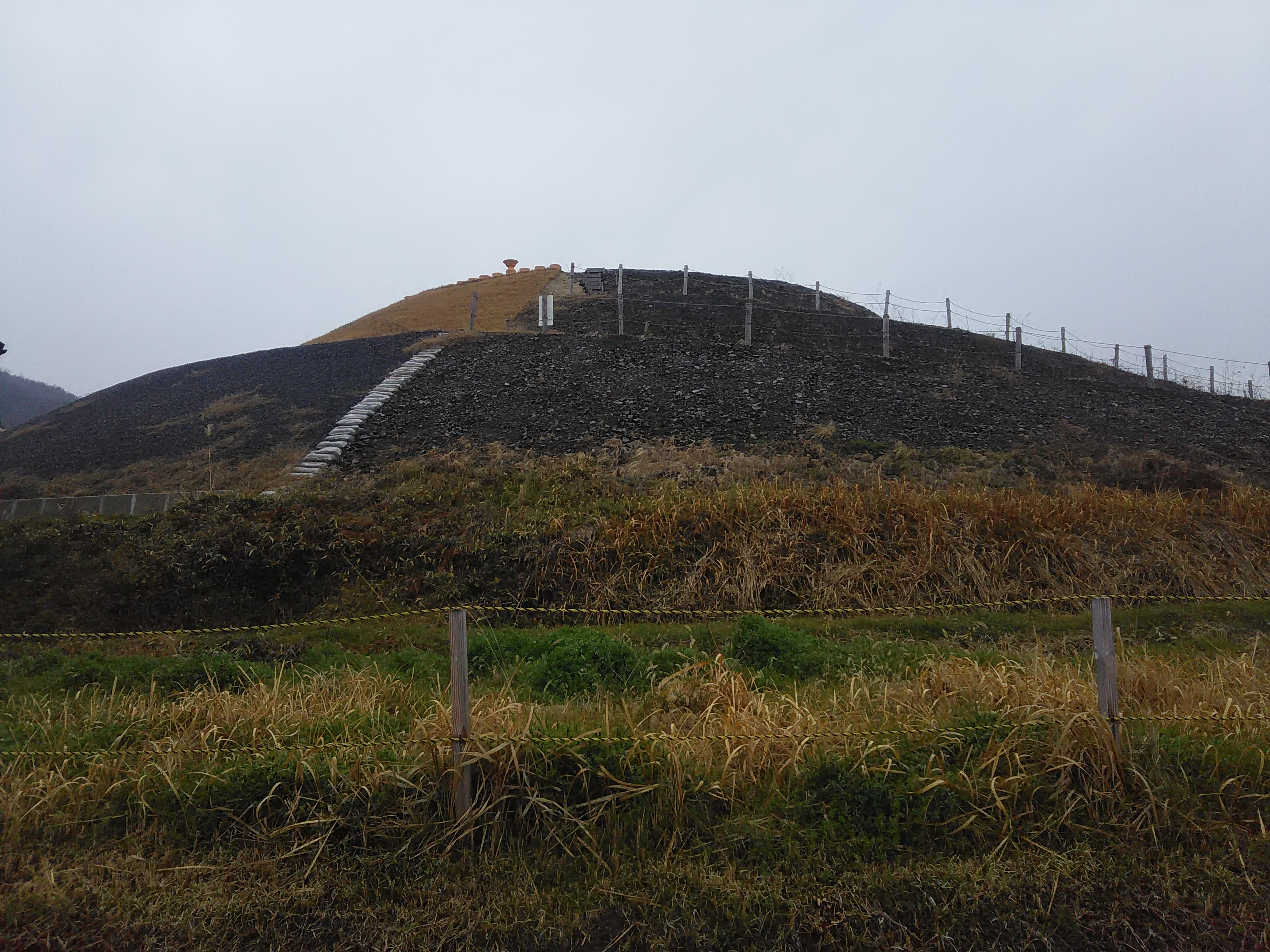 復元工事中の千足古墳2019年3月6日